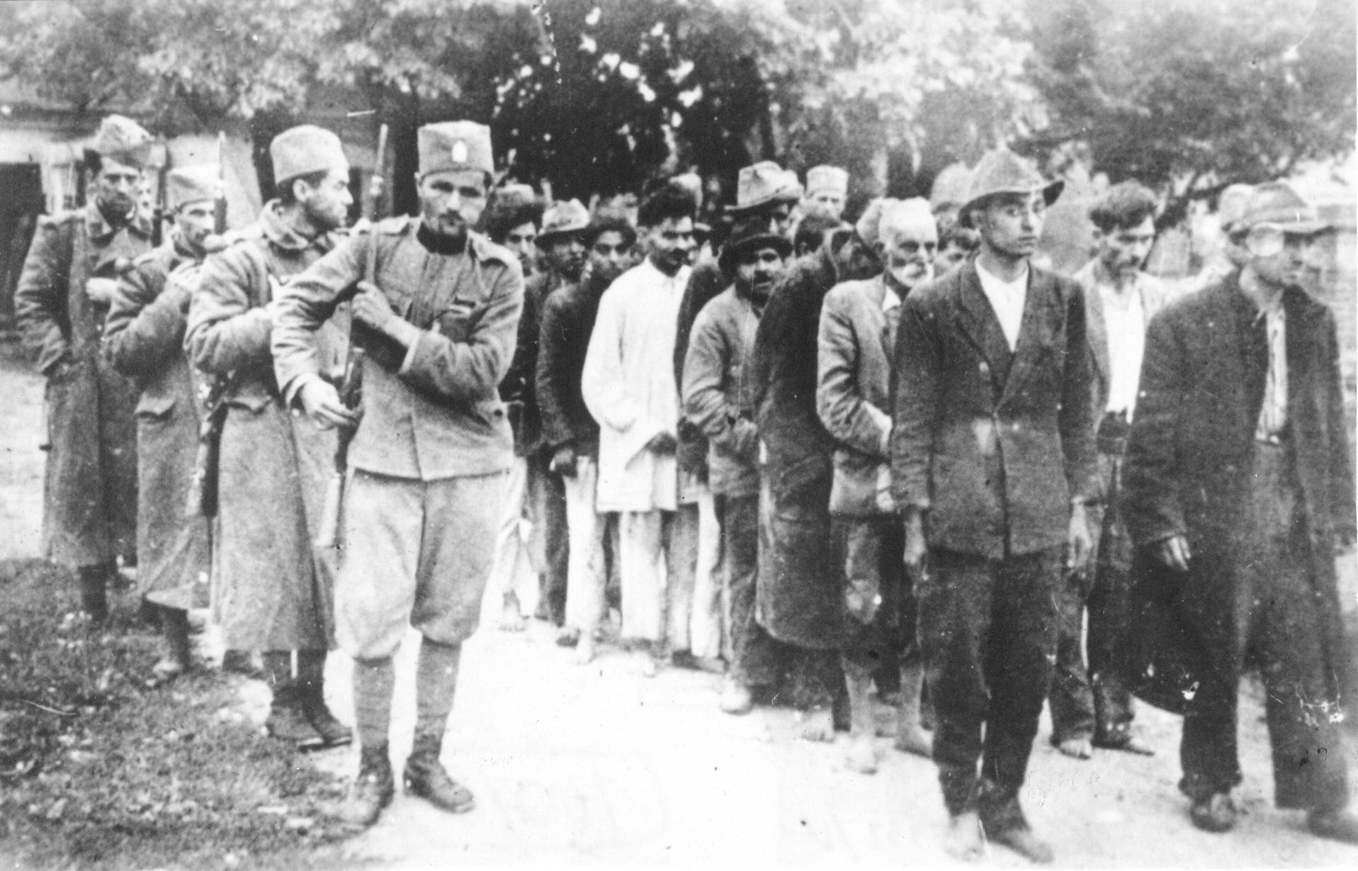 Srpskohrvatski / српскохрватски: Žandari lojalni marionetskoj Nedićevoj vladi odvode Rome na streljanje, u Šapcu, septembra 1941. godine.